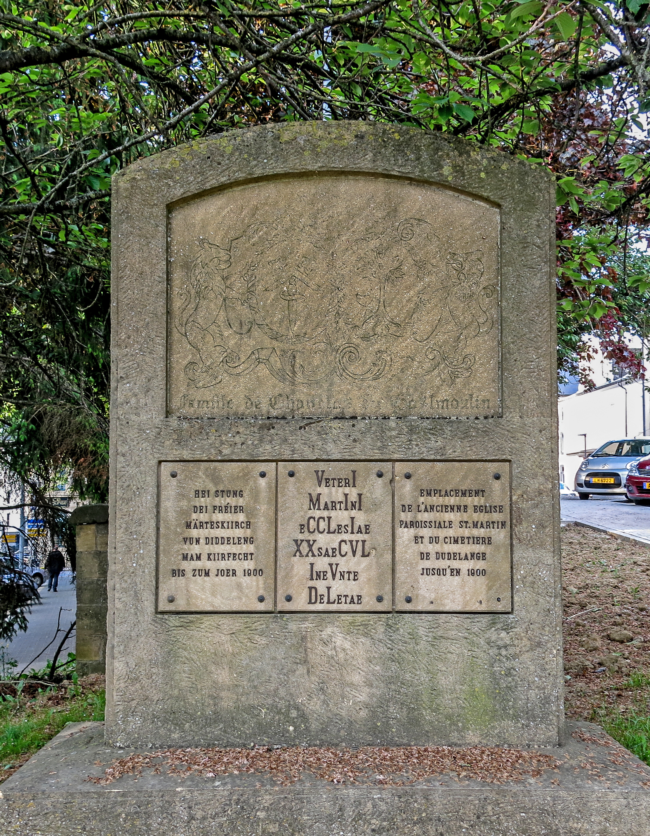 Beim Strutzbier, do wou bis 1900 d'Diddelenger Kierch an de Kierfecht waren.